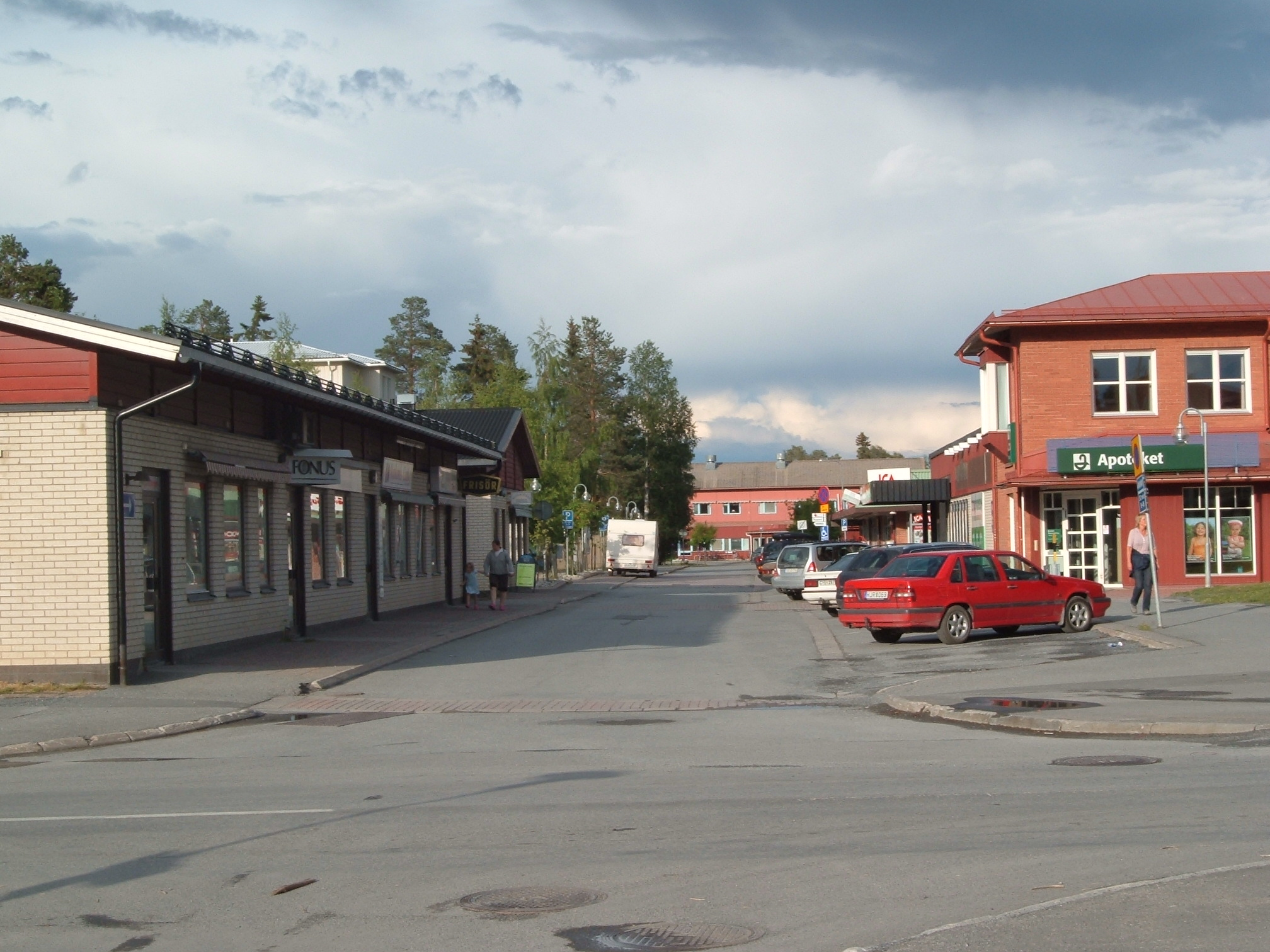 Krokoms centrum